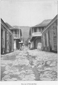 Vue de la ville portuaire de Port-de-Paix à Haïti.